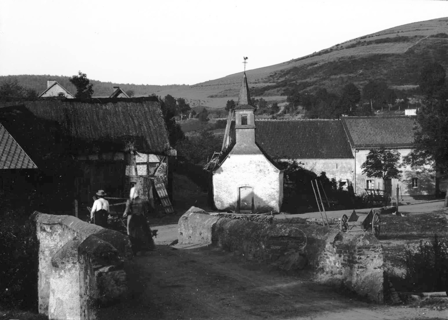 Sankt Donatus in Gemünden, Stadt Daun, Lieserstraße. Dorfansicht in der Eifel (fünf der Bilder des Bestands zeigen die Weinfelder Kirche)